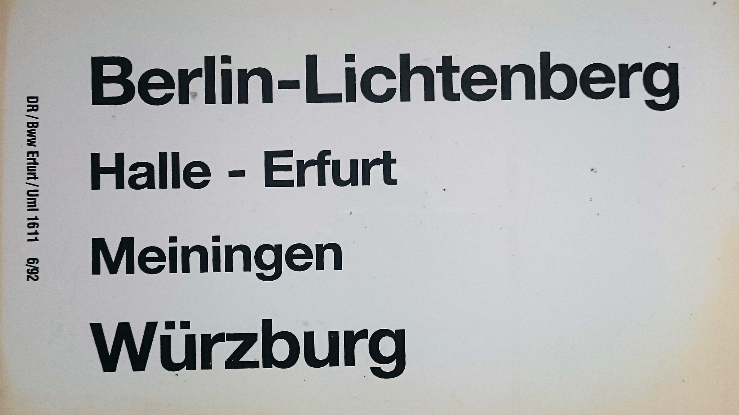 Zuglaufschild Berlin-Meiningen-Würzburg aus den 1990er Jahren.